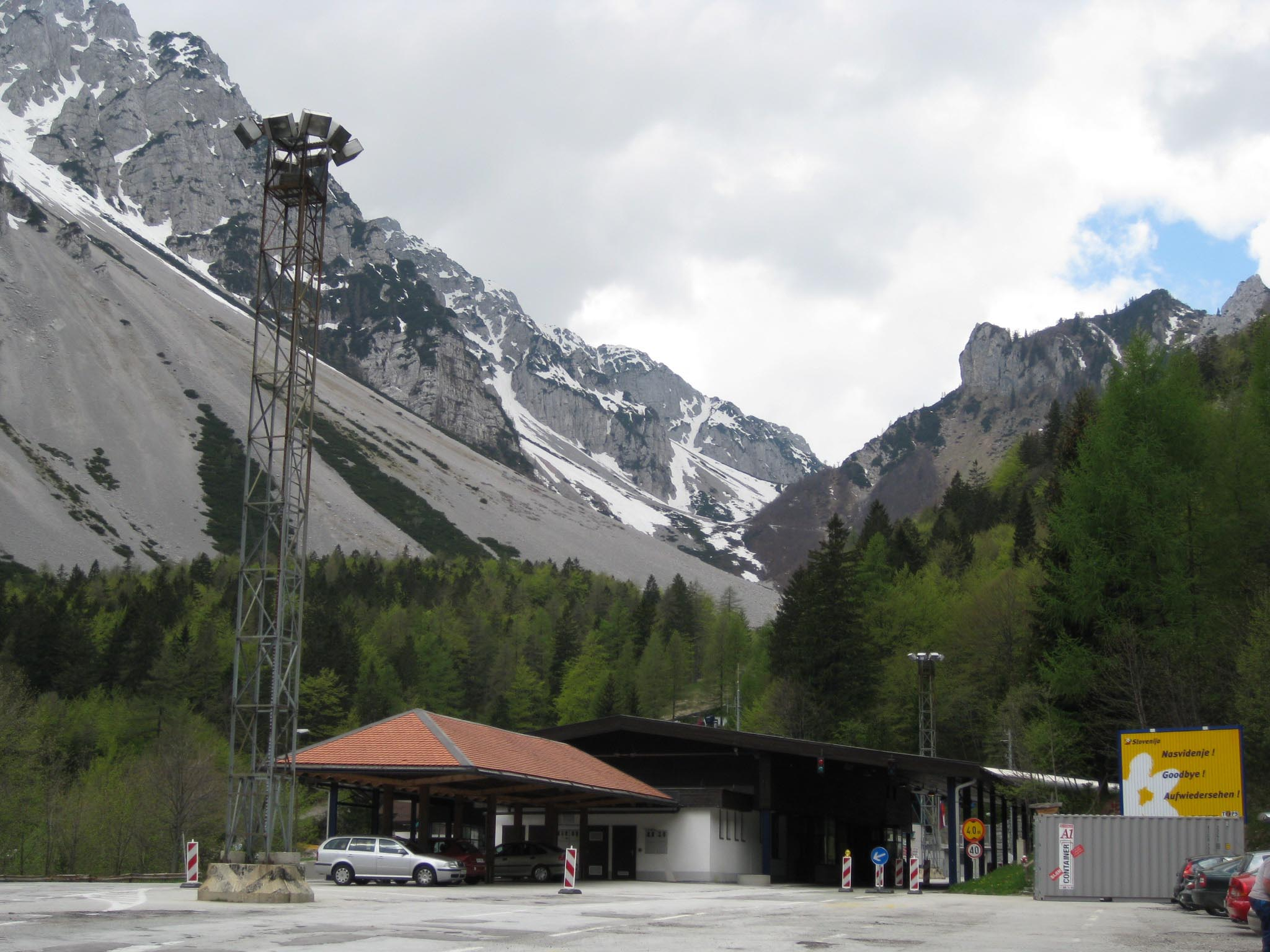 Ljubelj, border between Slovenia and Austria to 20.12.2007